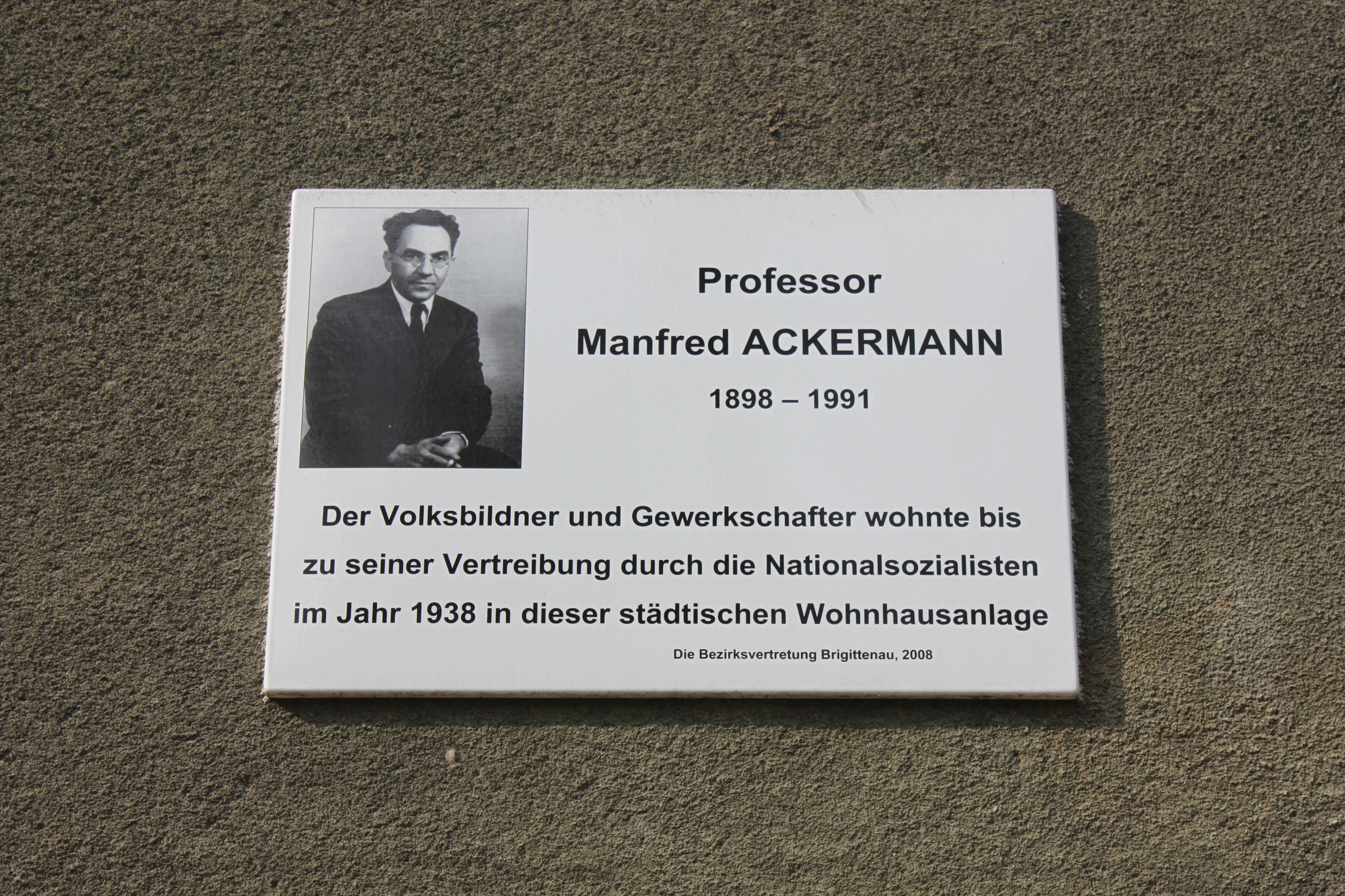 Manfred-Ackermann-Hof, Kommunaler Wohnbau, Feuerwache und Wohnhaus, Information zur Benennung auf Manfred Ackermann